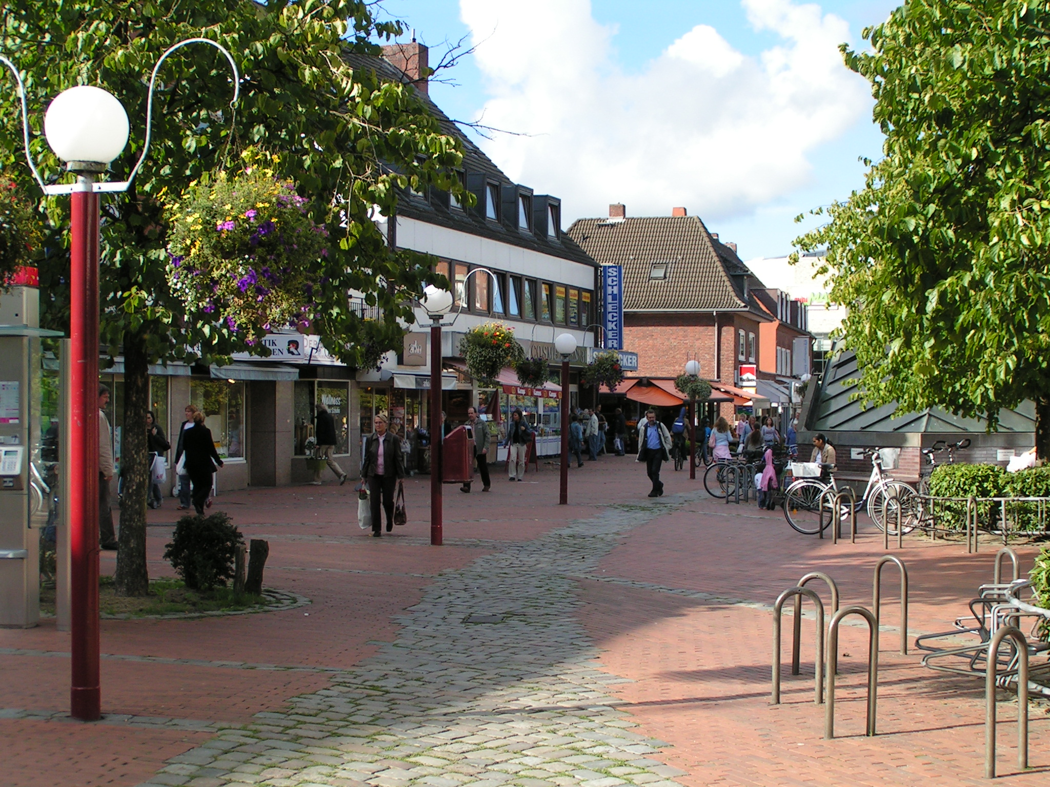 Fußgängerzone Niendorf-Markt Nordteil (Hamburg) - 2006